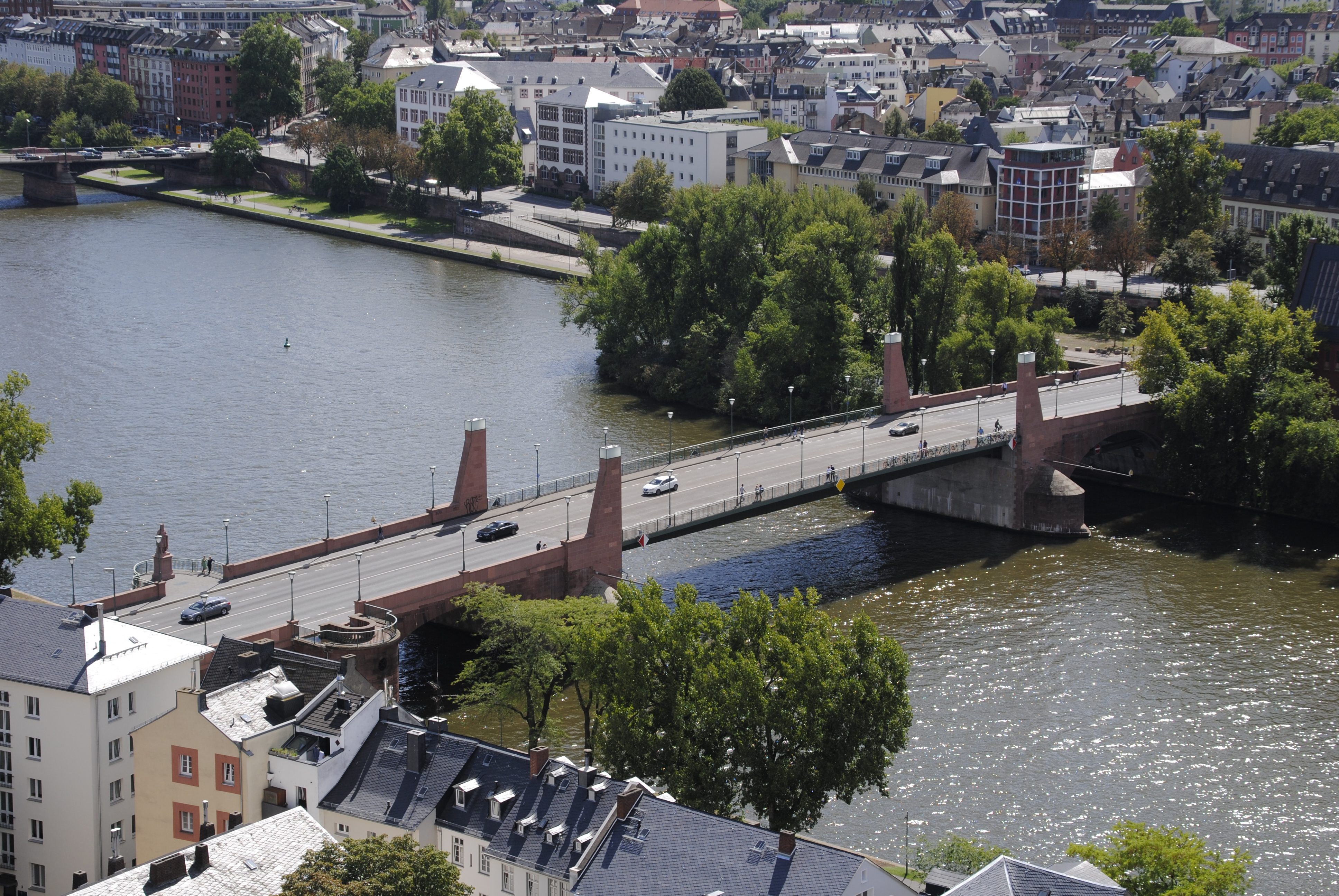 Alte Brücke Frankfurt, Blick vom Domturm